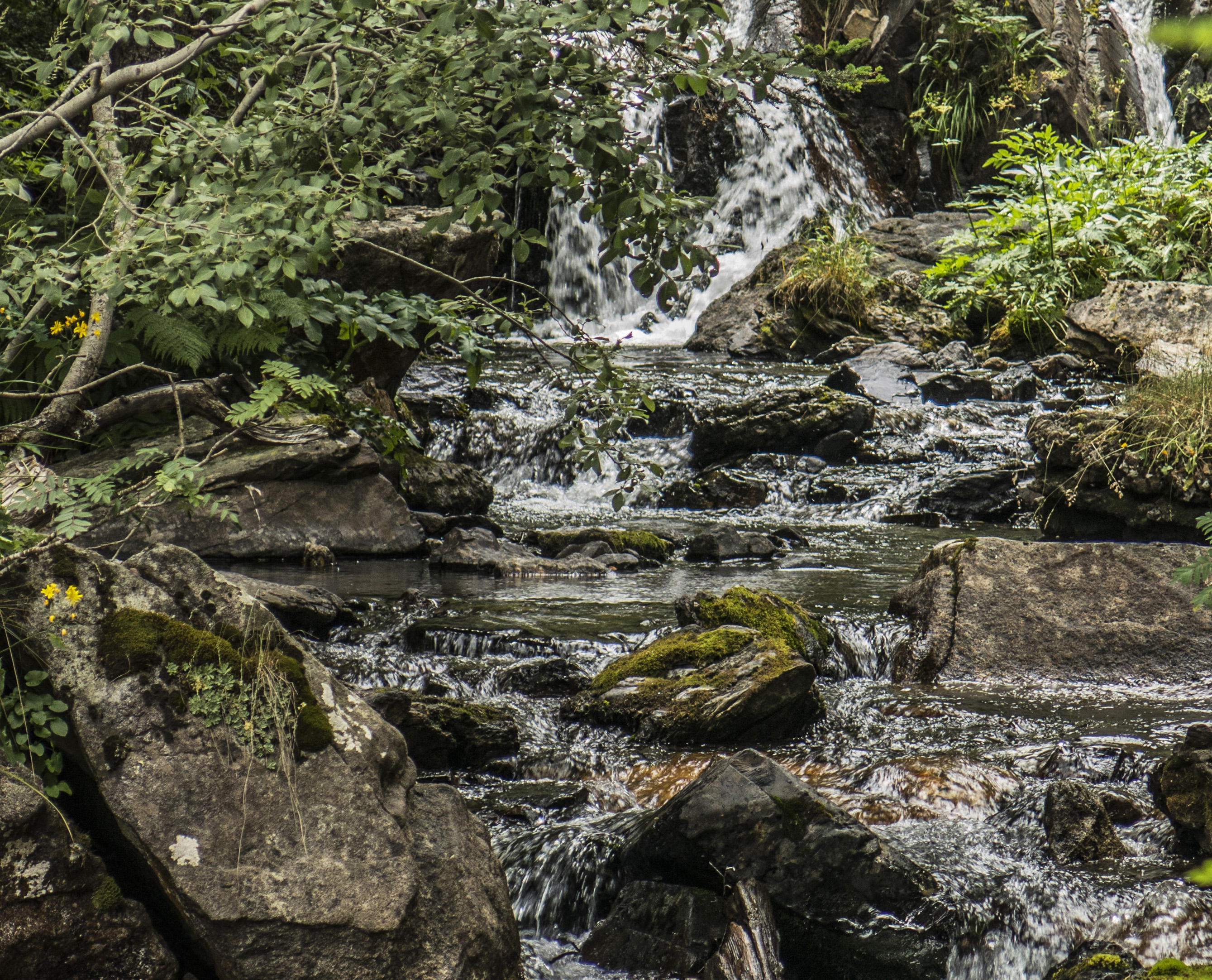 Barranc del riu Estós, afluent de l'Éssera, al Parc Natural de Pocets-Maladeta (Osca).